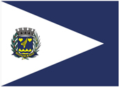 Bandeira do município de: Dourado, São Paulo, Brasil